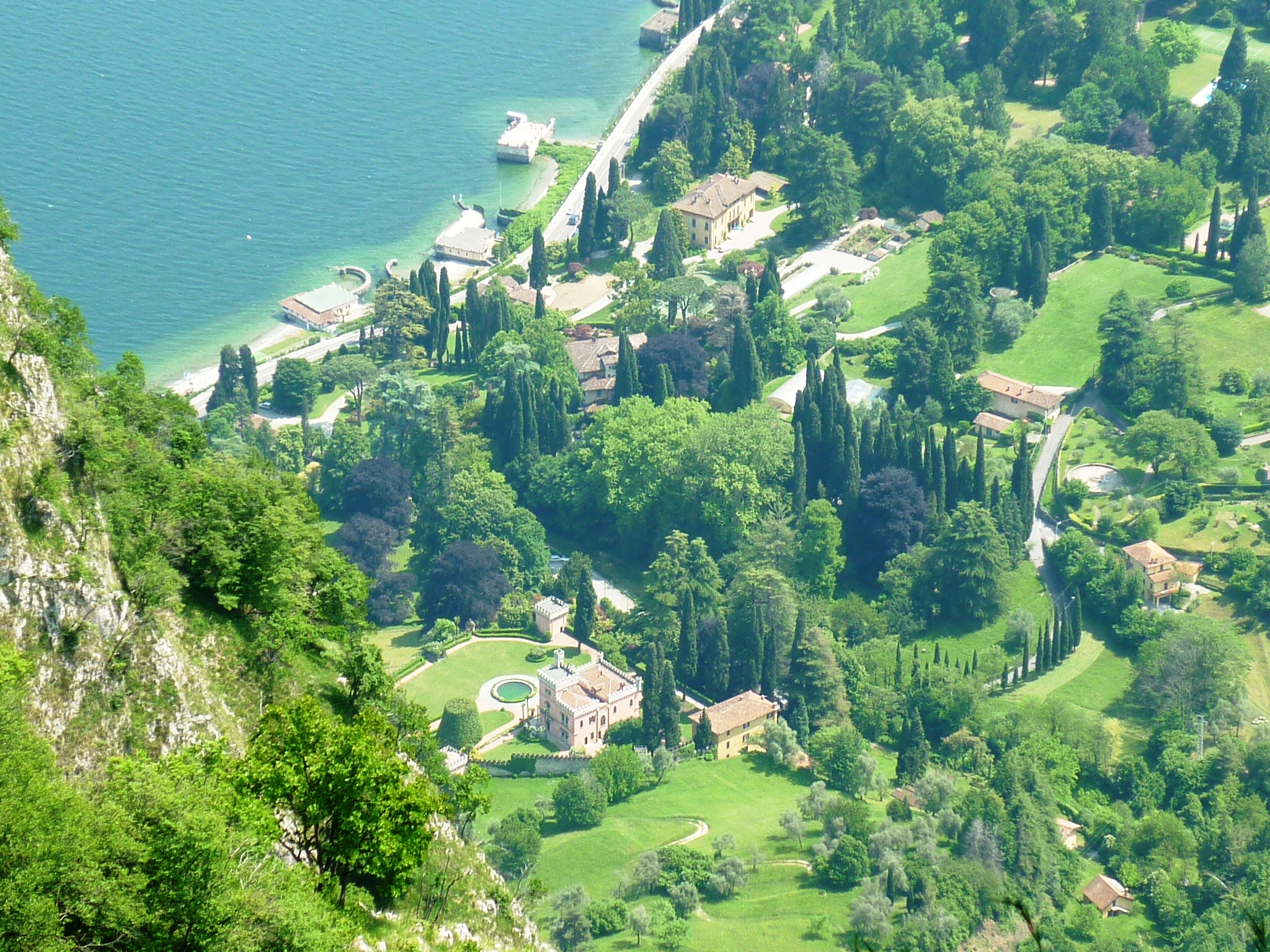 Castello und Villa Collina, Griante, Comersee, Italien